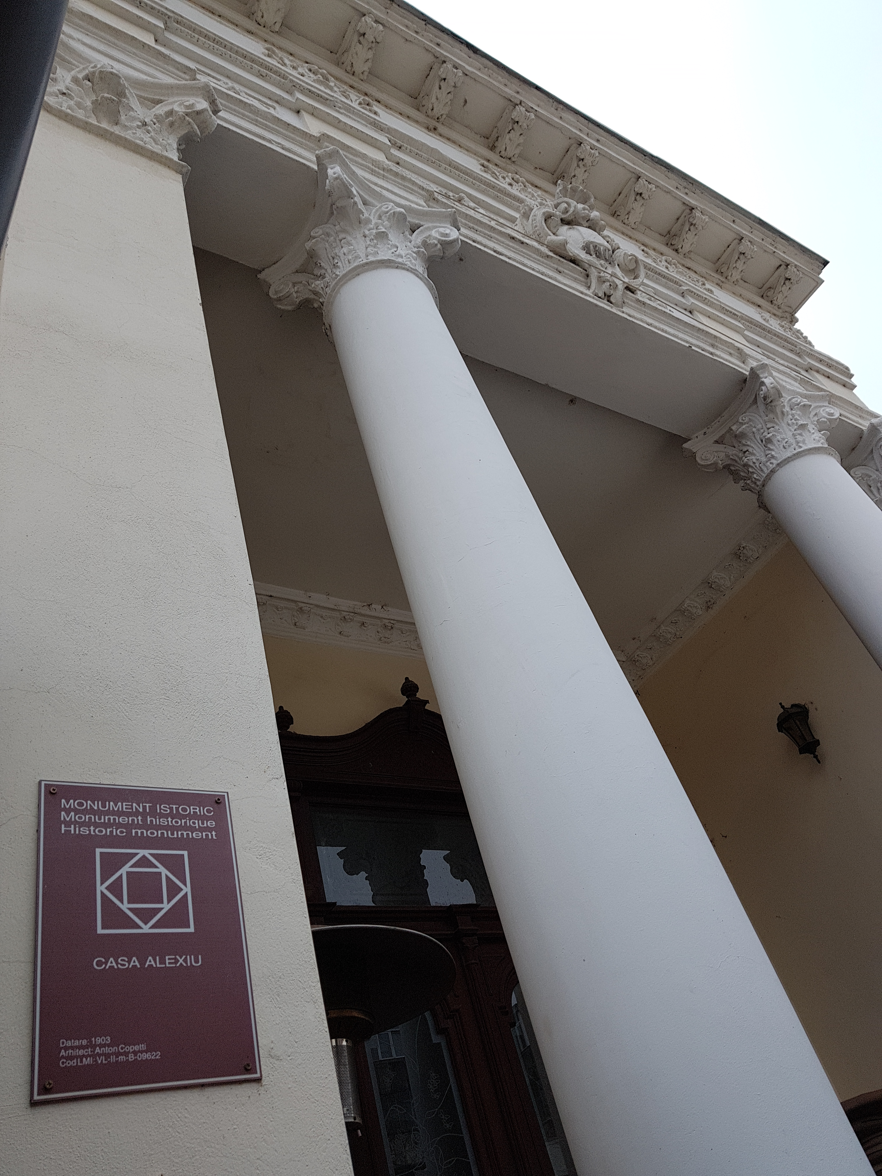 Casa Alecu Alexiu. -municipiul Râmnicu Vâlcea, Str. Regina Maria 19 (1890-1895)